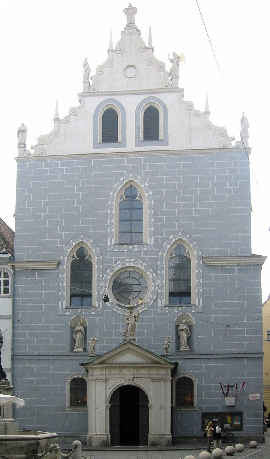 Wien, Franziskanerkirche